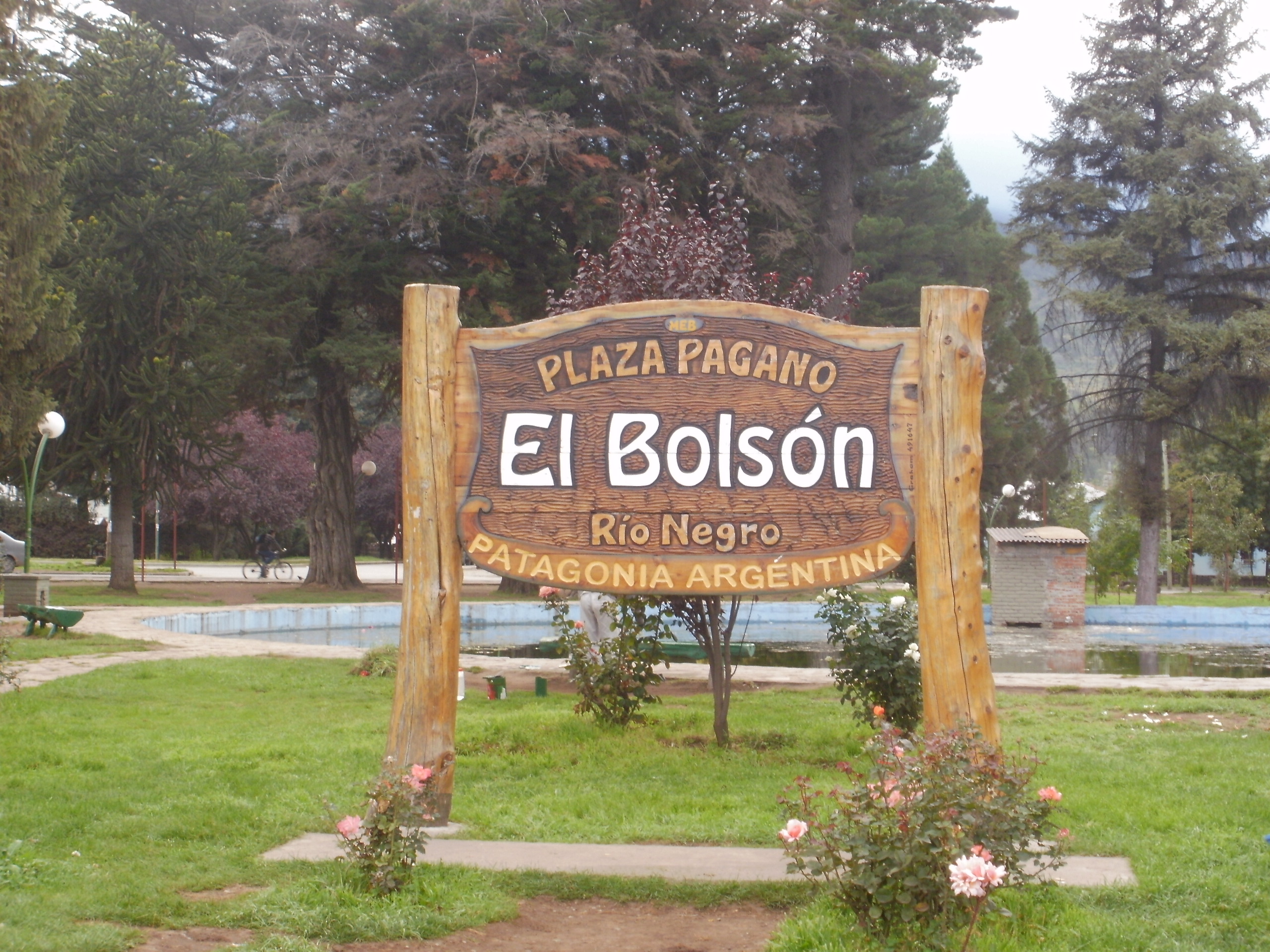 Cartel de la Plaza Pagano - El Bolsón - Río Negro